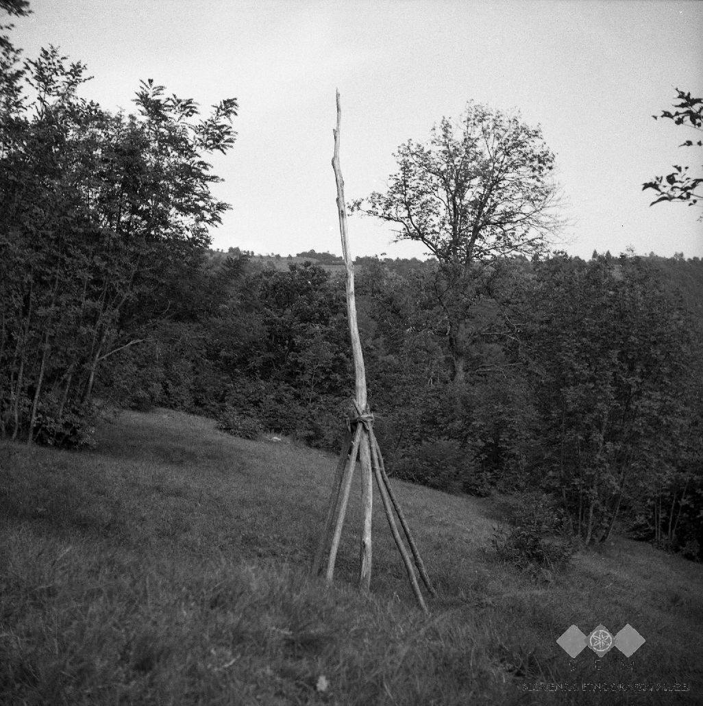 "Stržje" s stogi (4) za seneno kopo, Podpoznik - Vrisk.